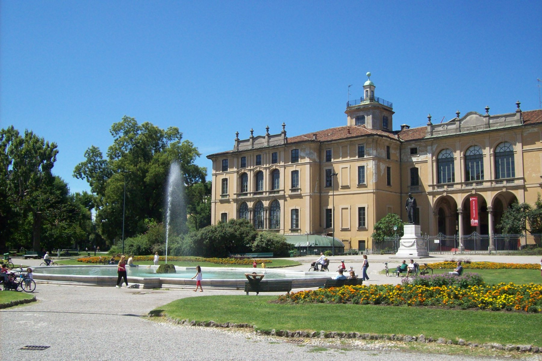 Giardini Pubblici Indro Montanelli - Palazzo Dugnani - Milano